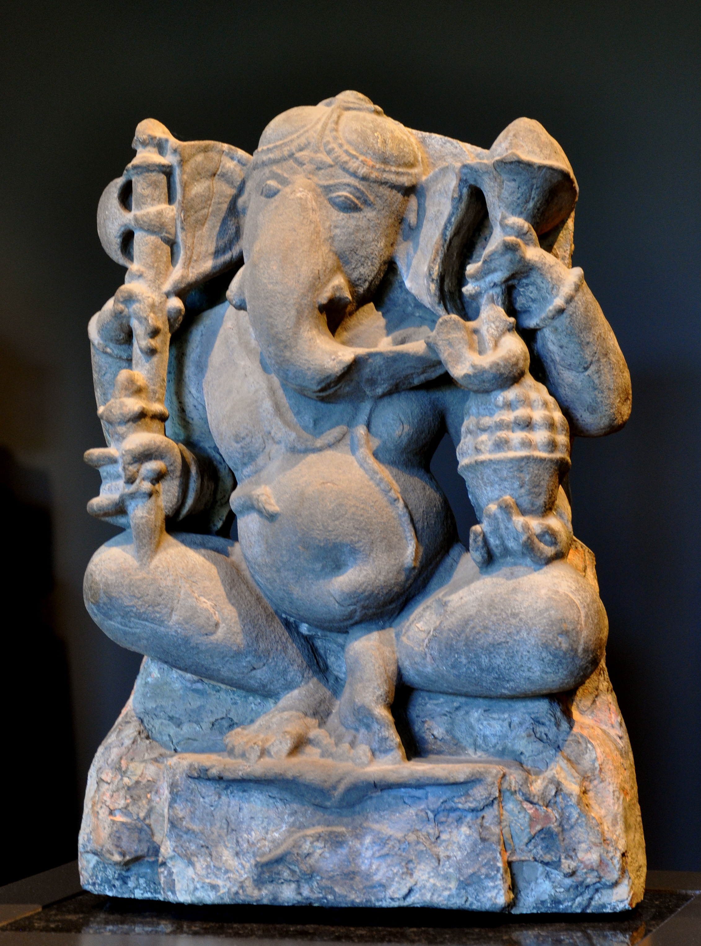 Ganesha; Indien, Bundelkhand, Chandella-Dynastie, 11. Jahrhundert, Sandstein Museum Rietberg, Zürich; Geschenk Alice Boner; Inv. Nr. RVI 258(?)